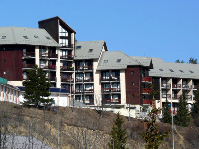 Gresse-en-Vercors (Isère, France) - Vue partielle de la résidence "Les Dolomites", entre la Station et le village. .